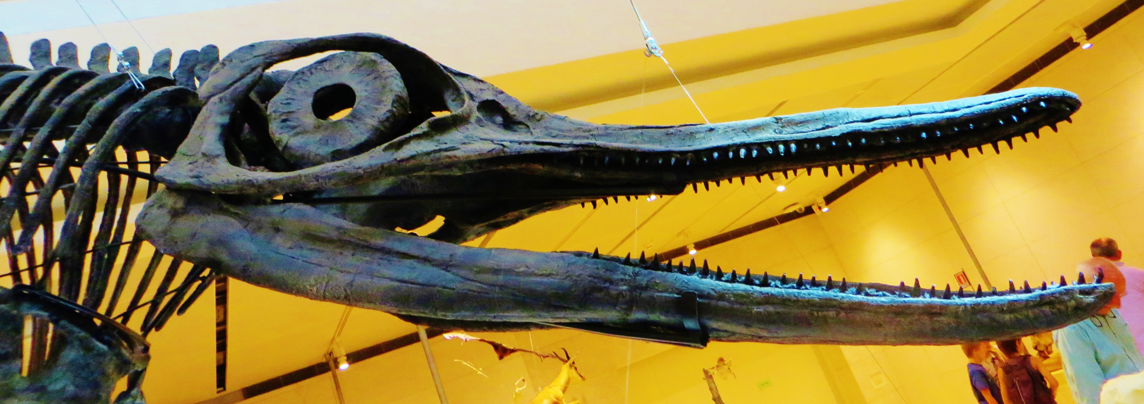 Fossil of Ophthalmosaurus, an extinct reptile- Took the picture at Muse (Trento)